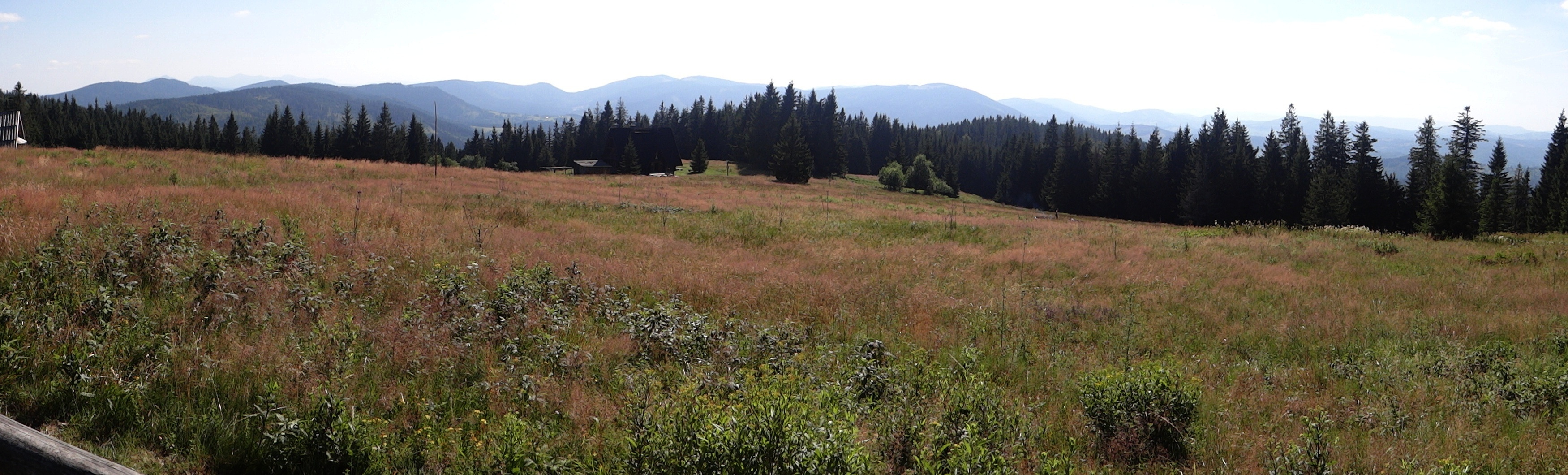 Hala Krawcula